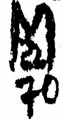 Monogramme du peintre français Alfred Manessier. Scan d'après dessin dédicacé. This signature is believed to be ineligible for copyright and therefore in the public domain because it falls below the required level of originality for copyright protection both in the United States and in the source country (if different). In this case, the source country (e.g. the country of nationality of the signatory) is believed to be France. Cette image ou le texte qui y est représenté est seulement composé de formes géométriques simples et de texte. Elle n’atteint pas le seuil d'originalité nécessaire pour la protection du droit d’auteur, et est donc du domaine public. See autographs of Magritte and Picasso